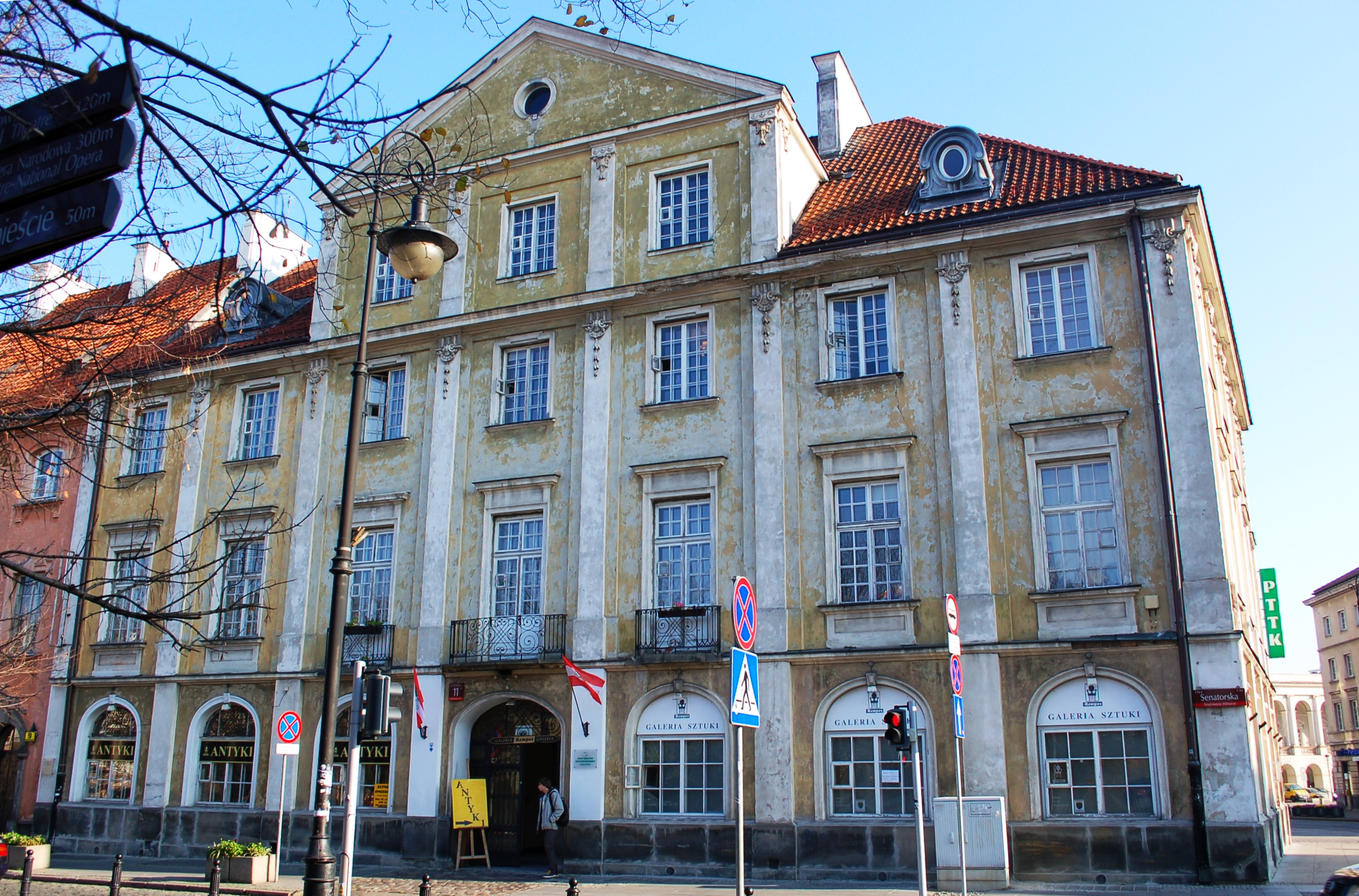 Warsaw, Miodowa, Senatorska